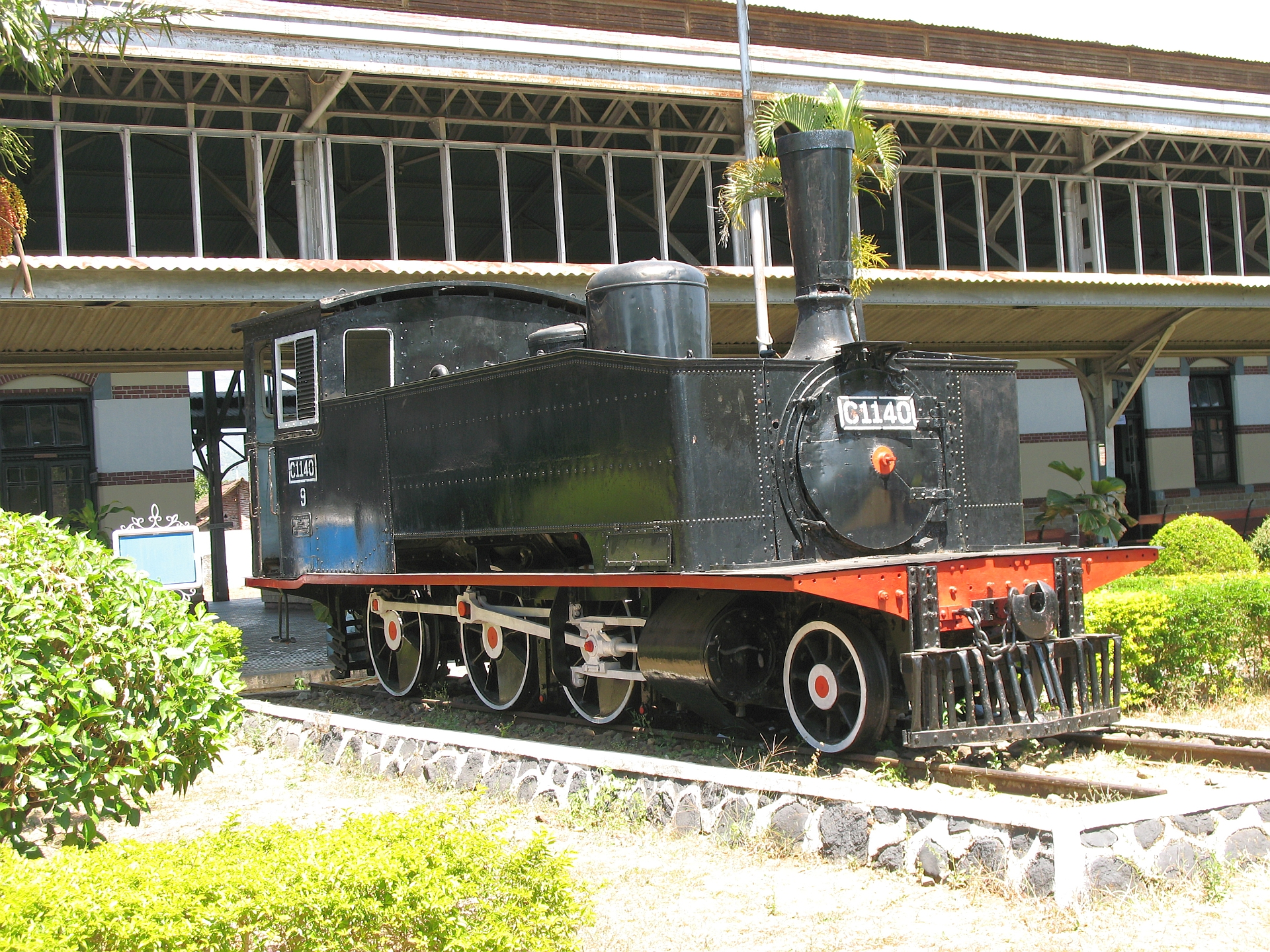 DKA C11 (C 11 40 C)